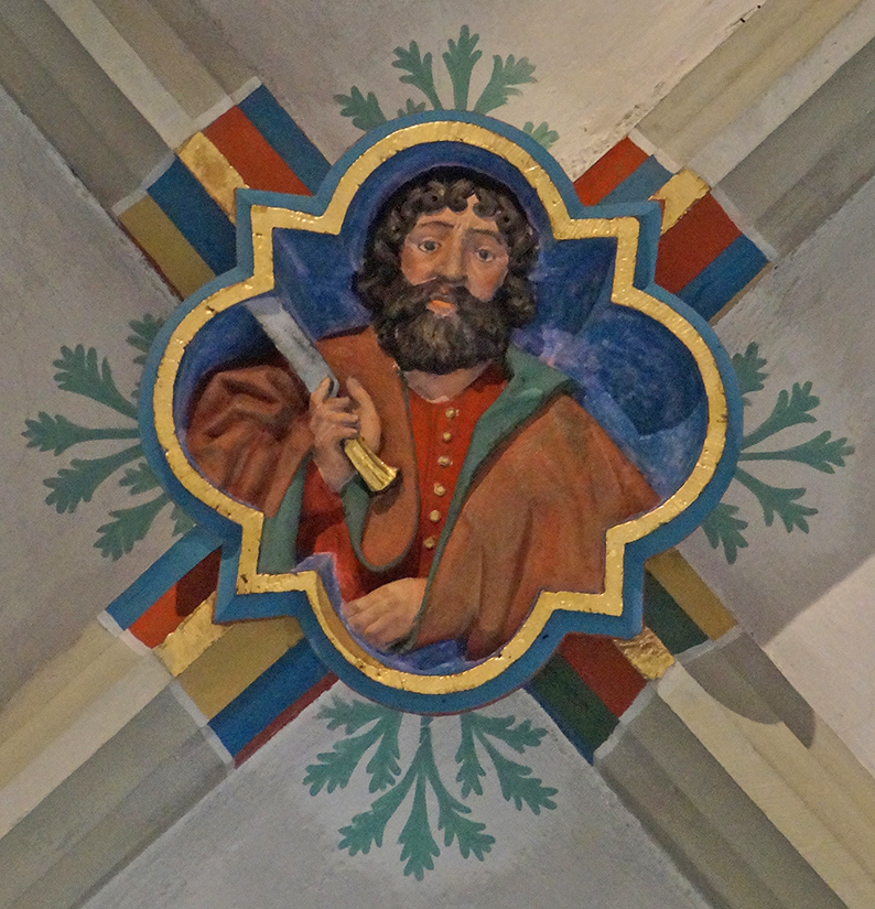 Schlussstein im Chor der Bartholomäuskirche in Markgröningen: Bartholomäus, Kirchenpatron (Motiv 3 von West nach Ost)